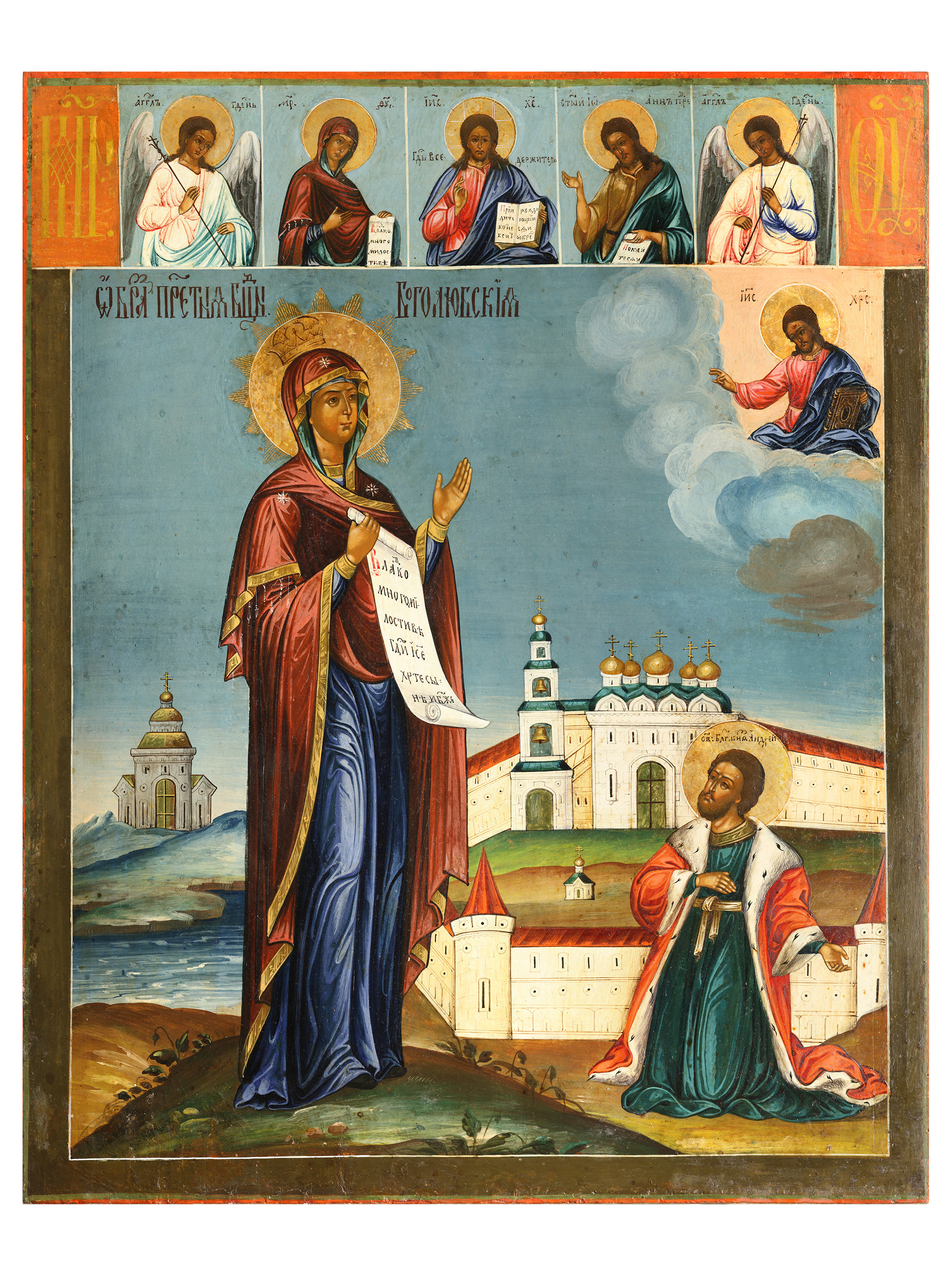 Икона «Явление Богоматери св. Андрею Боголюбскому» Слева на иконе изображена Богоматерь в рост вполоборота к центру со свитком в правой руке. Справа лицом к Богоматери – стоящий на коленях князь Андрей Боголюбский в мантии, подбитой горностаем. Позади него – панорама Боголюбского монастыря за белокаменной крепостной стеной, с высокой колокольней и пятикупольным храмом. Вверху справа – образ благословляющего Спаса. Выше – Деисус из пяти икон. В «Житии кн. Андрея Боголюбского» с XVIII в. и «Летописи Боголюбского монастыря» содержится сказание о явлении Богоматери князю Андрею во время переноса иконы Владимирской Богоматери, когда повозка остановилась и Богоматерь повелела поставить икону во Владимире, а на месте ее явления поставить храм и монастырь. По заказу Андрея Боголюбского была написана икона с образом явившейся Богоматери со свитком в руке, установлен в честь события праздник, основан Боголюбский монастырь. Иконы с изображением на фоне Боголюбского монастыря князя Андрея, стоящего на коленях перед Богоматерью, распространяются с XVIII в. Вверху на многих памятниках сохраняется пятифигурный Деисус, который был на походных иконах князя.